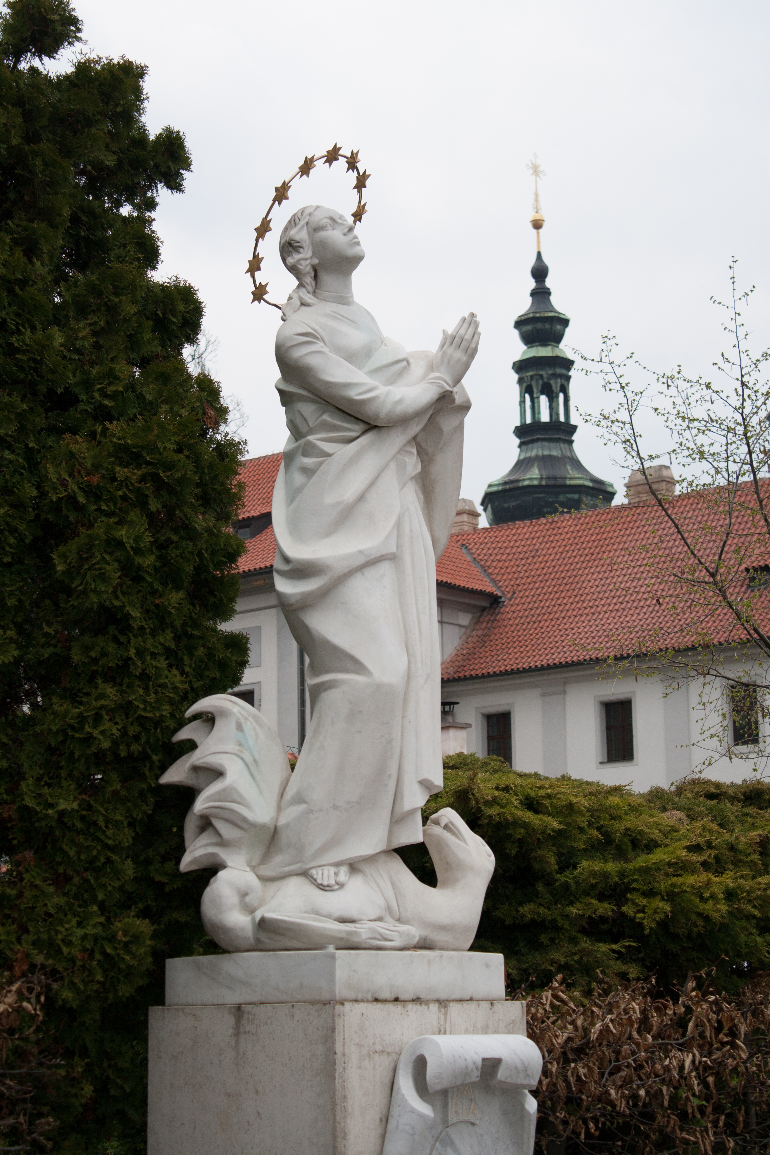 Socha Panny Marie z Exilu na pozadí kláštera premonstrátského, Strahovského